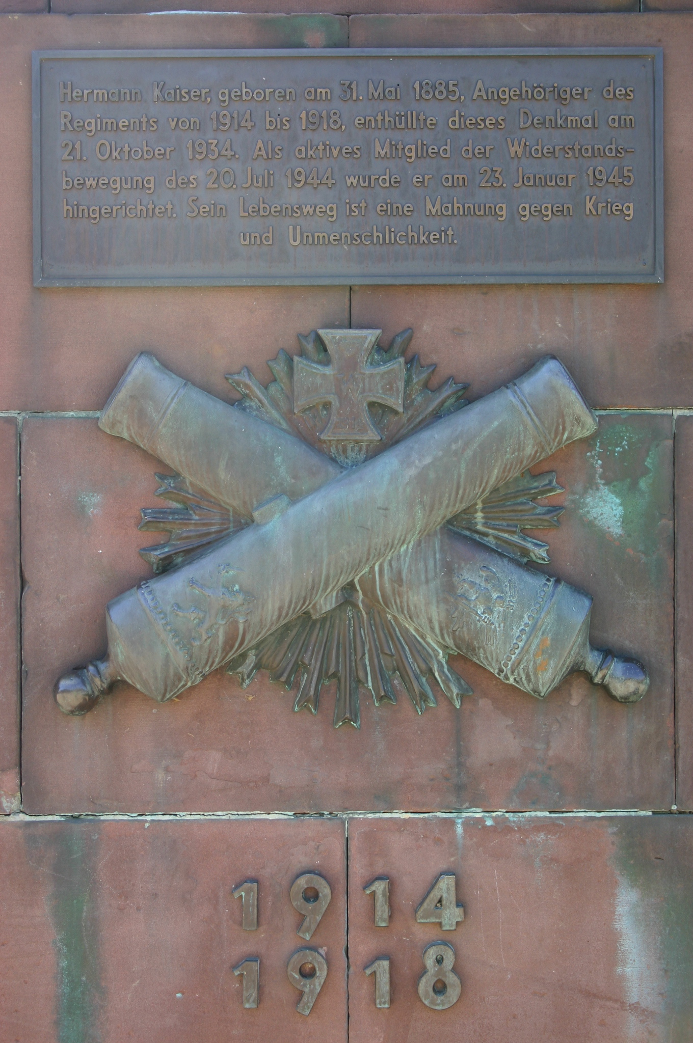 Gedenktafel am Denkmal des 1. Nassauischen Artillerieregiments Nr. 27 auf dem Wiesbadener Luisenplatz